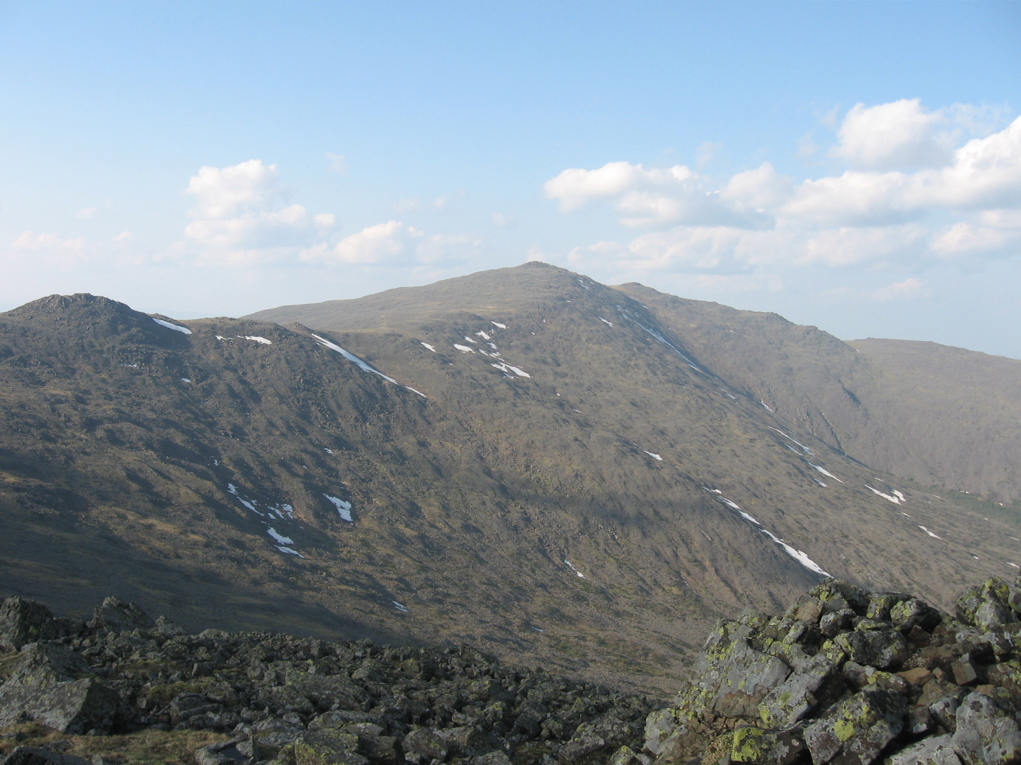 г. Конжаковский камень (1569 м, Северный Урал) с г. Острая Косьва (1403 м) в конце июня